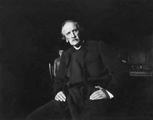 Григорий Петрович Шухов. Фото В. Г. Шухова, 1890 г.